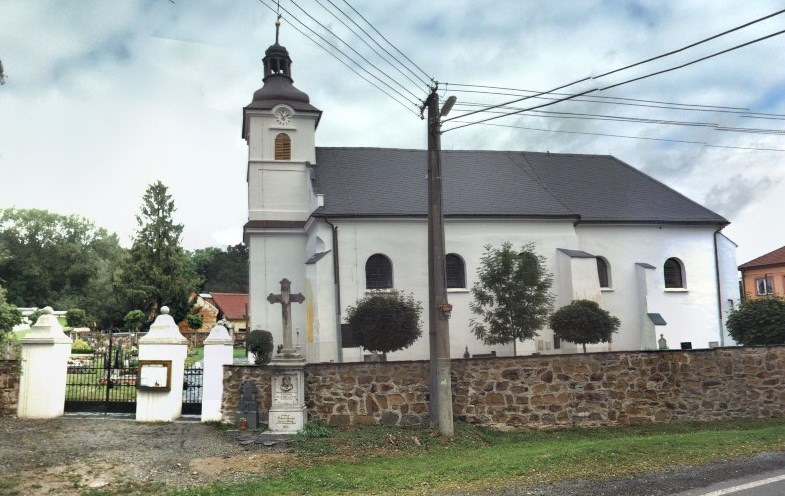 Kostel v Bohušově (2017)